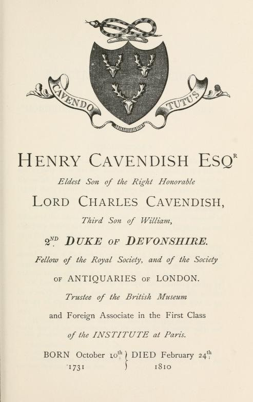 Todesanzeige von Henry Cavendish